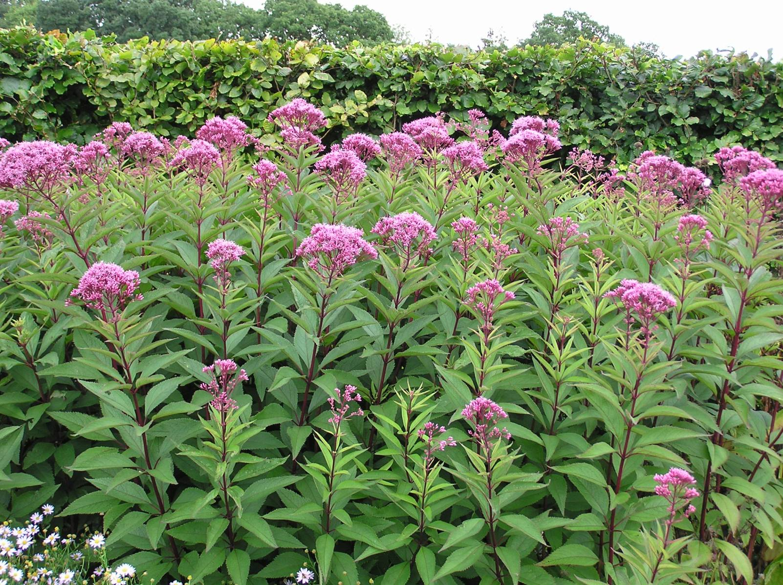 Eupatorium purpureum. Real Jardín Botánico de Madrid.